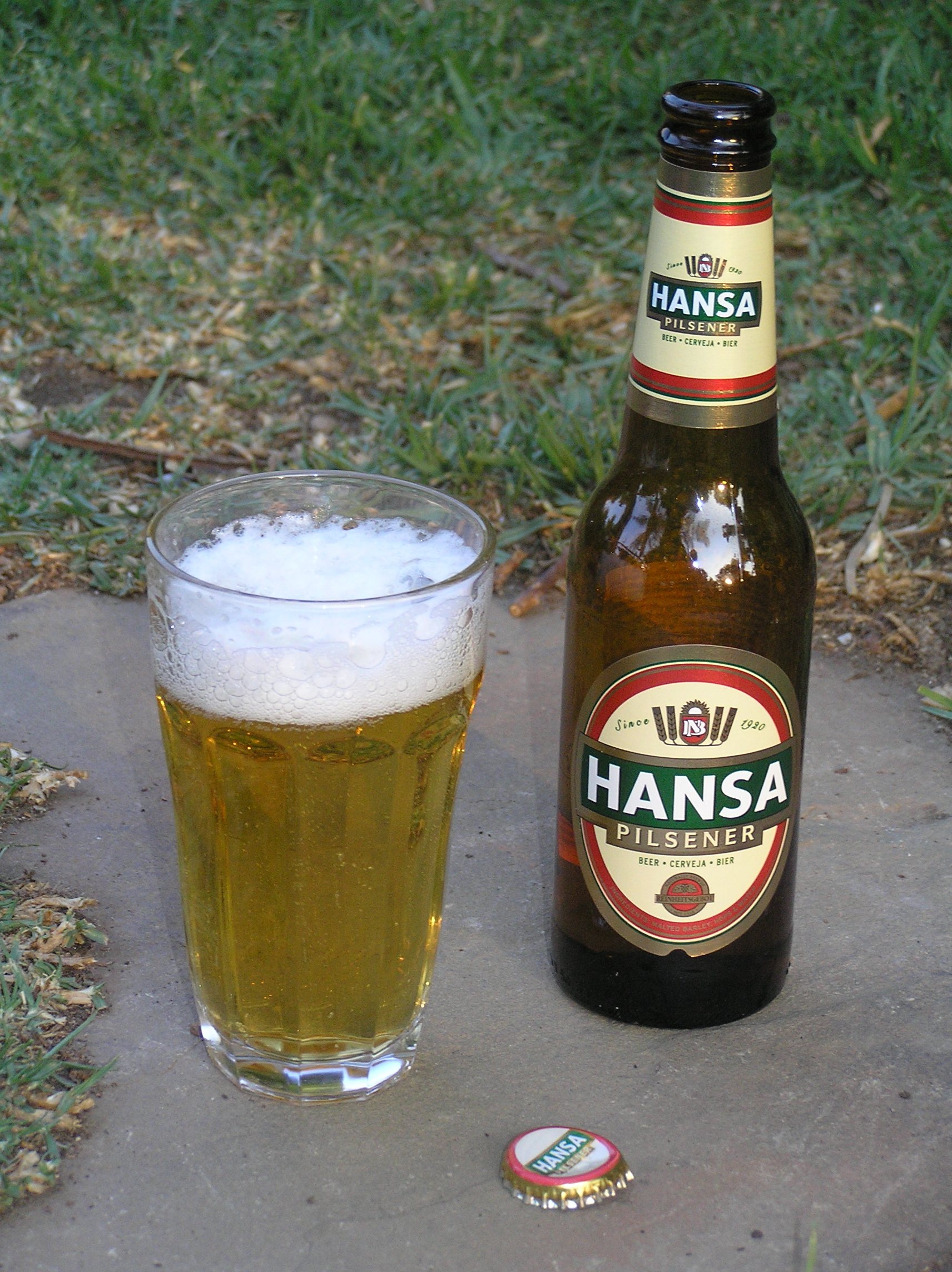 Hansa-pilsener-bottle